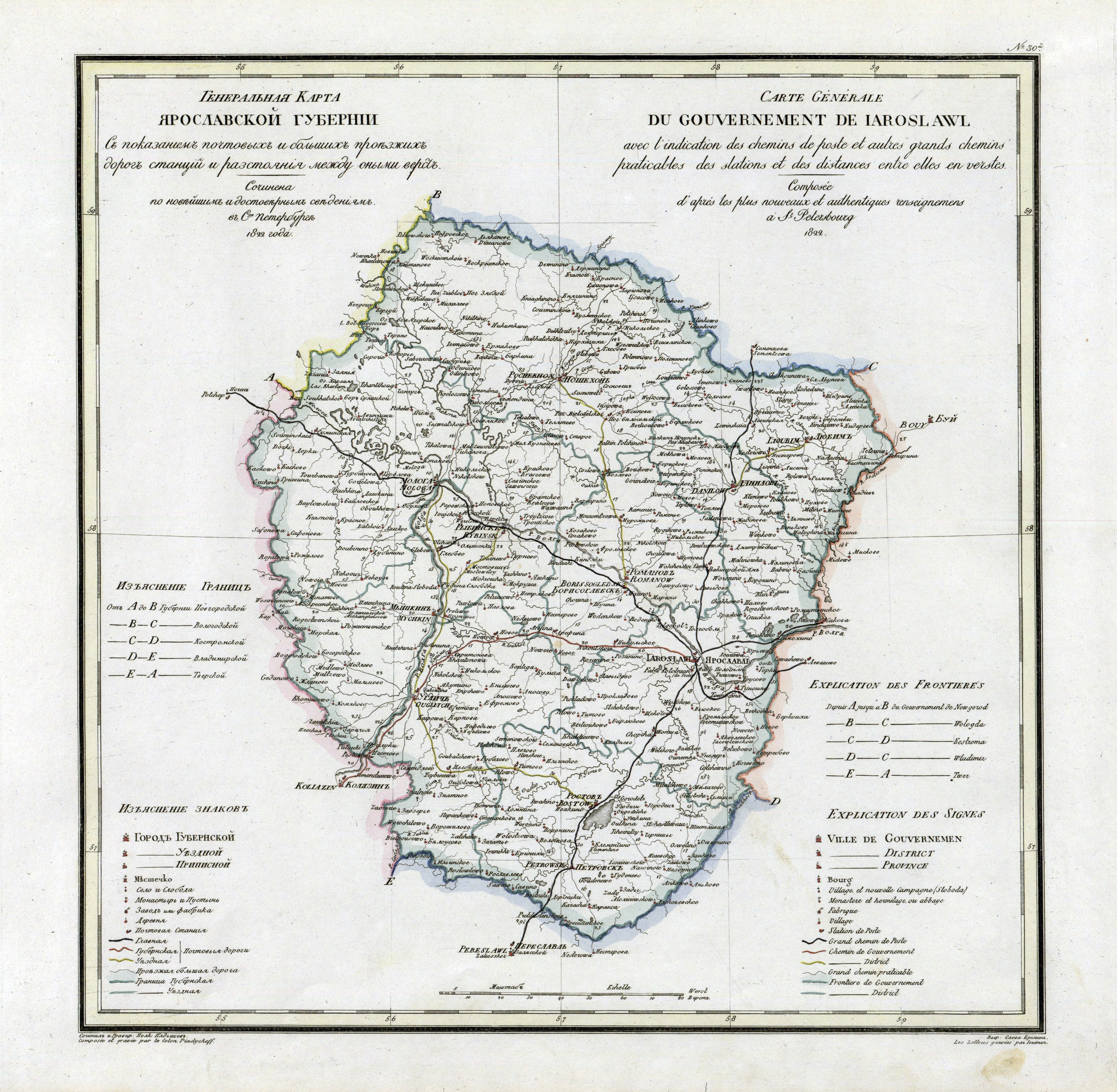 Атлас Российской империи, 1821 год. Ярославская губерния